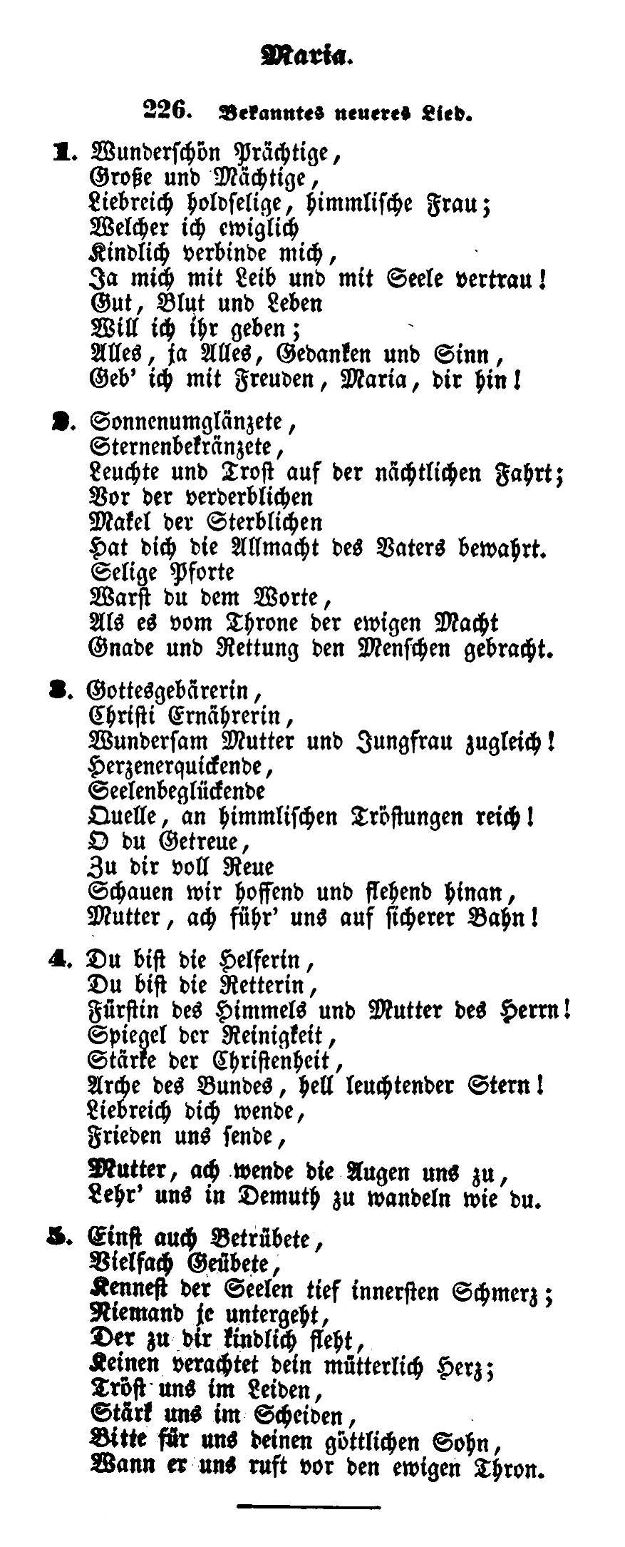 Das Marienlied Wunderschön prächtige in der Fassung von heinrich Bone (1847)